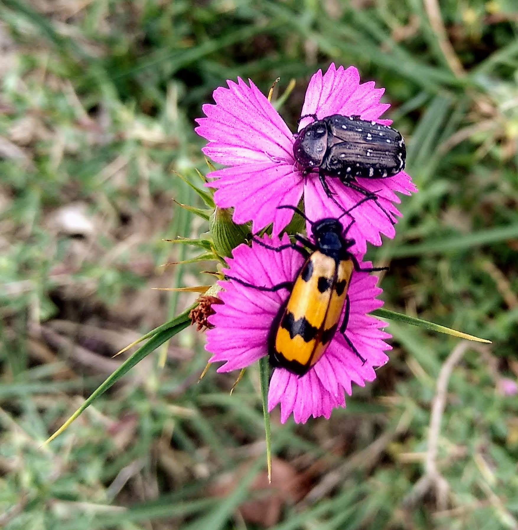 Oxythyrea funesta (Poda, 1761) - Cetoniidae and Mylabris (Mylabris) variabilis (Pallas, 1781) - Meloidae